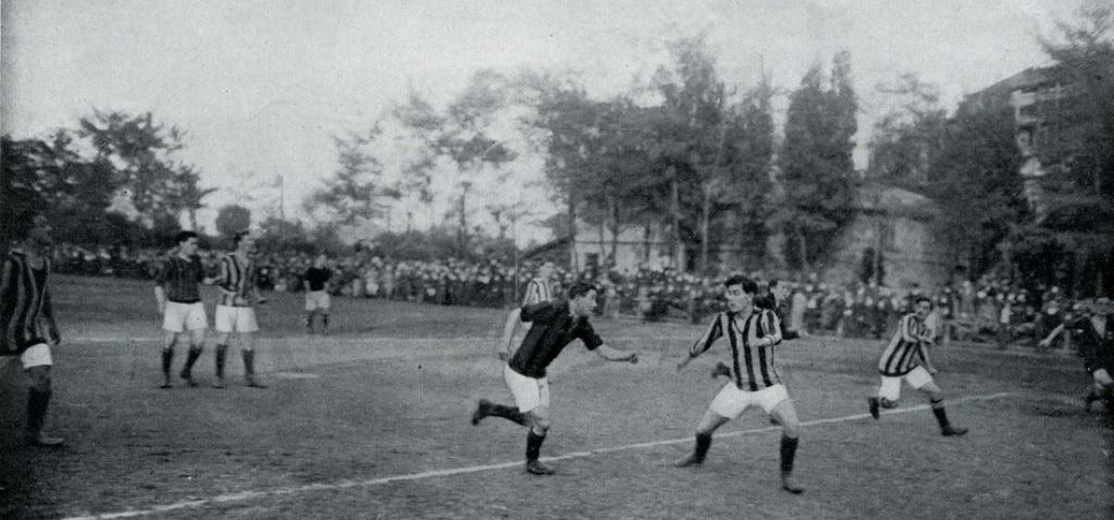 Milano, ottobre – novembre 1915. Una fase di un derby di Milano tra Inter e Milan valevole per la Coppa "Gazzetta dello Sport".